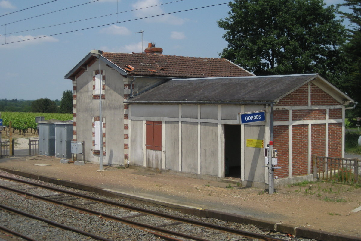 L'ancien bâtiment voyageur et l'actuel abris de quai de la voie 1 (vers Bordeaux)